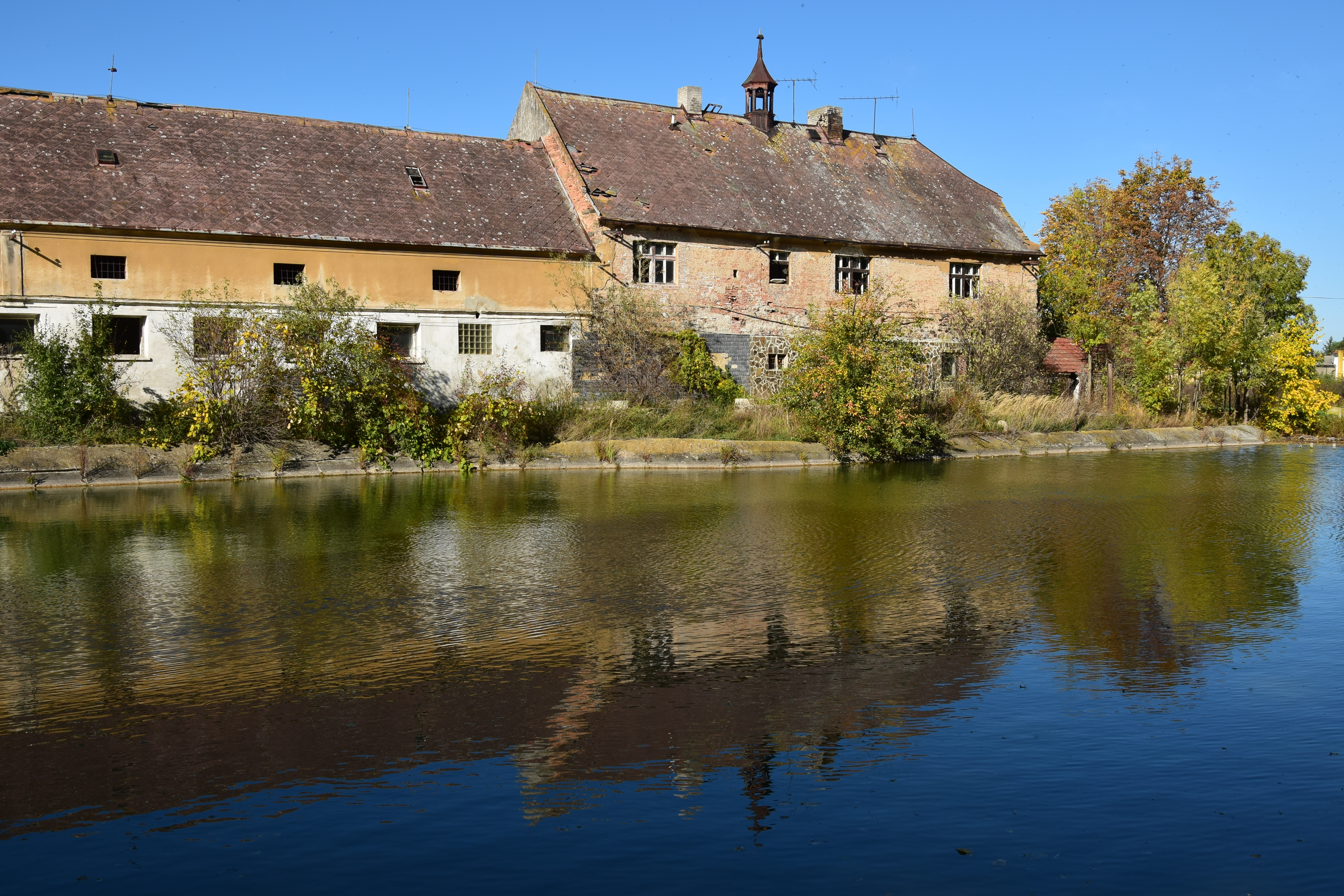 Chotěbudice – zemědělský dvůr